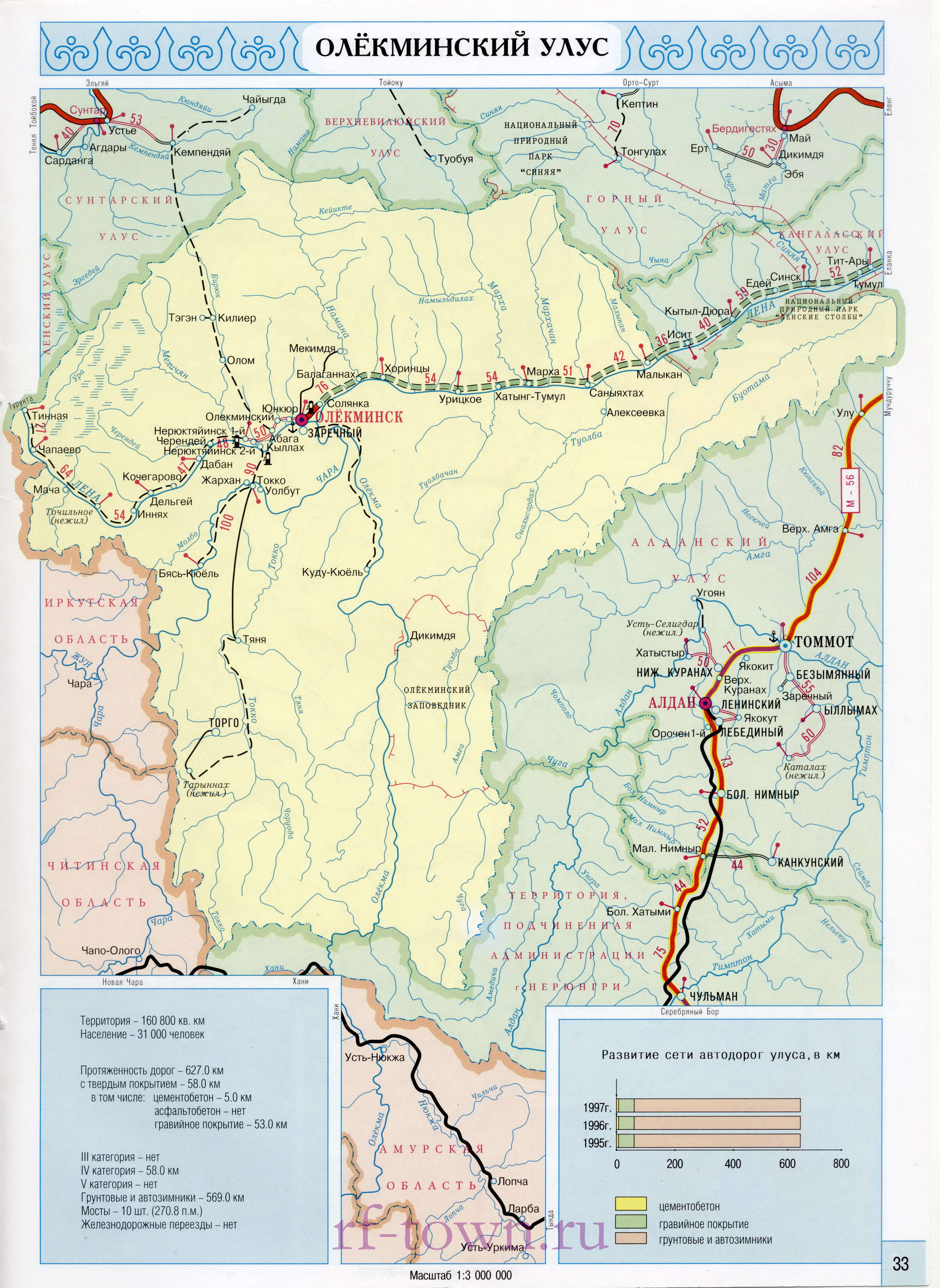 Карта Олекминского района, Республика Саха(Якутия)